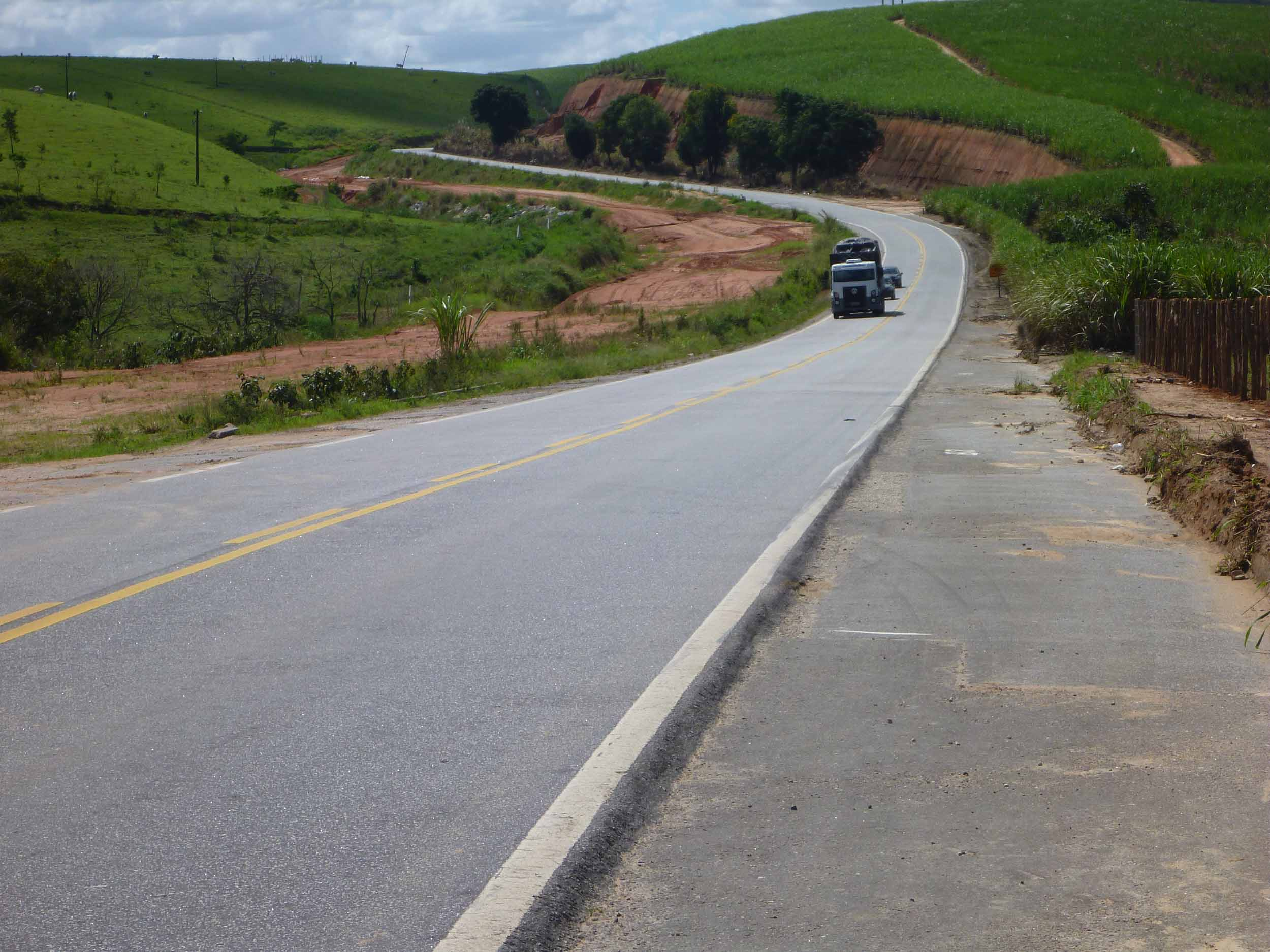 La BR-101 a su paso por el estado brasileño de Alagoas.